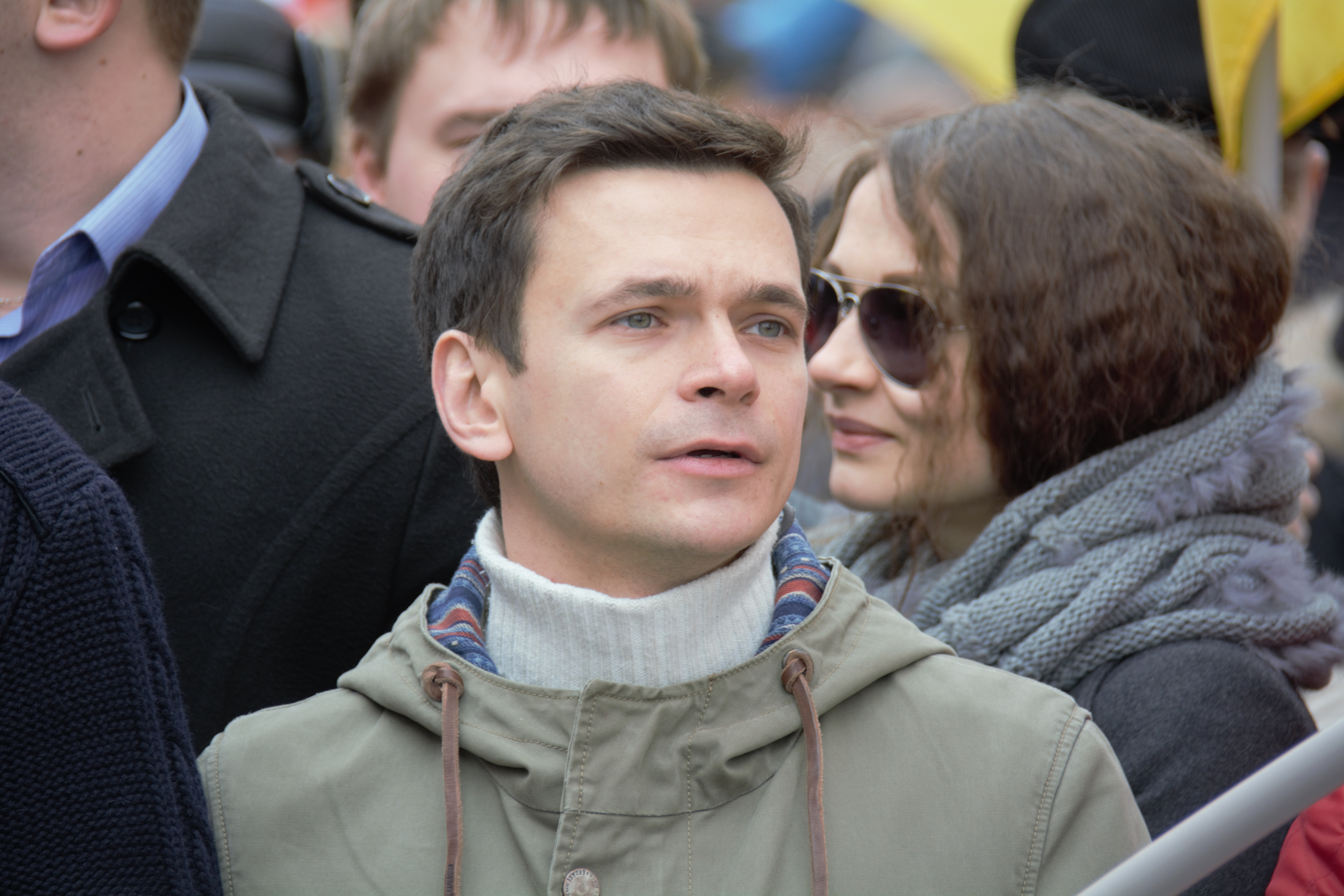 Илья Яшин